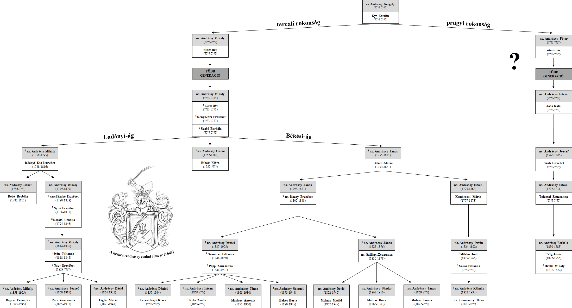 A nemes Andrássy család leszármazási táblája